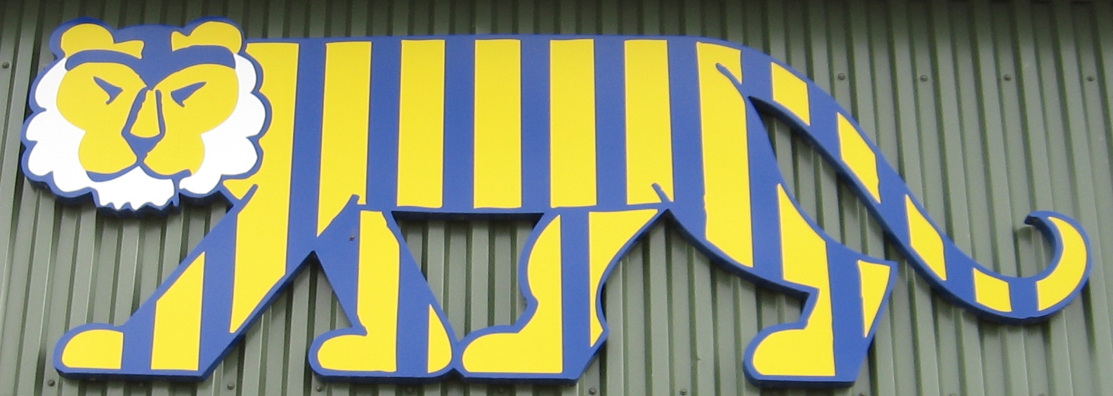 En svensk tiger-skylt